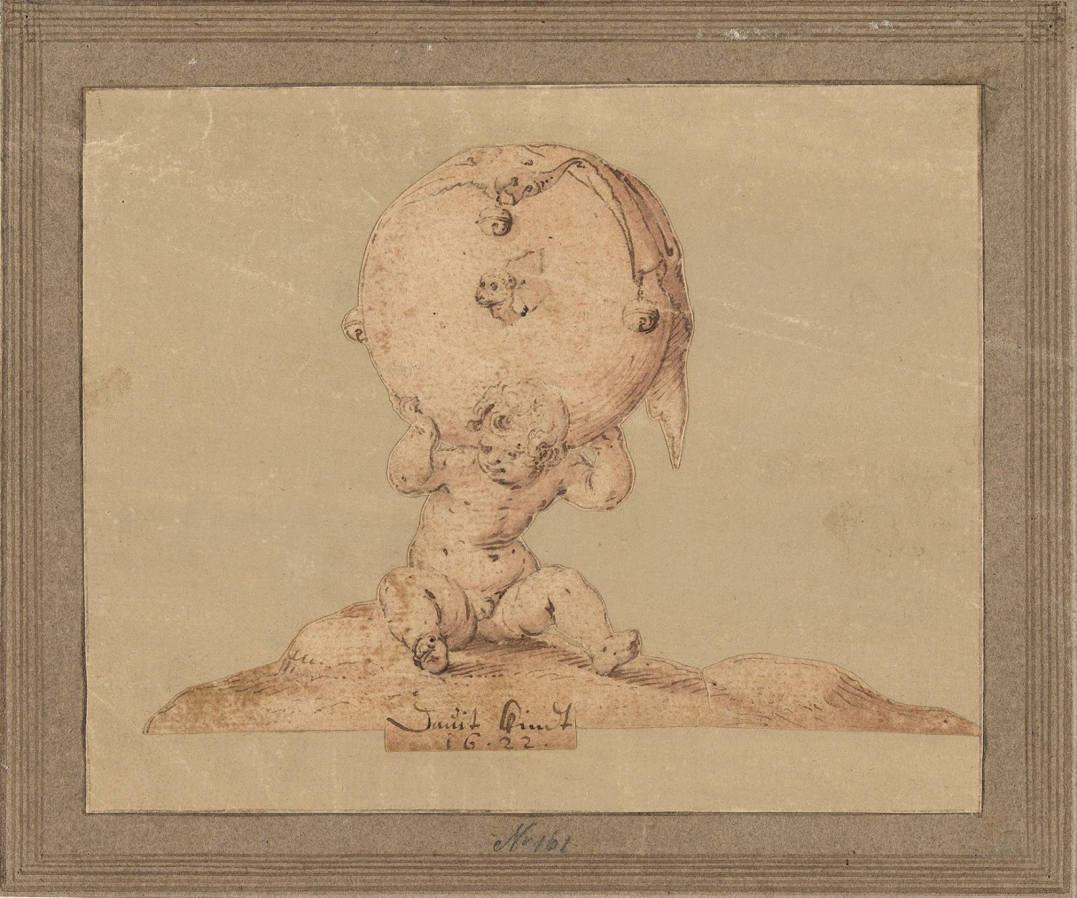 Allegorie auf die Narrheit der Welt (Kopie nach einem Gemälde von Cornelis Ketel), aquarellierte Federzeichnung, 10,5 × 14,5 cm